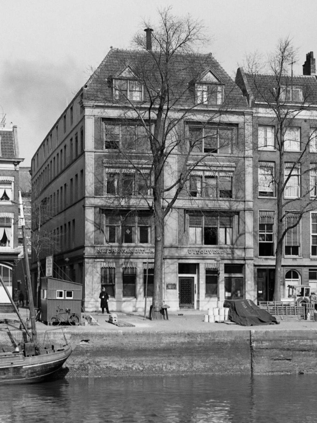 Reportage Nijgh en Van Ditmar. Het pand van Uitgeverij Nijgh en Van Ditmar aan de Wijnhaven 113 te Rotterdam 1933